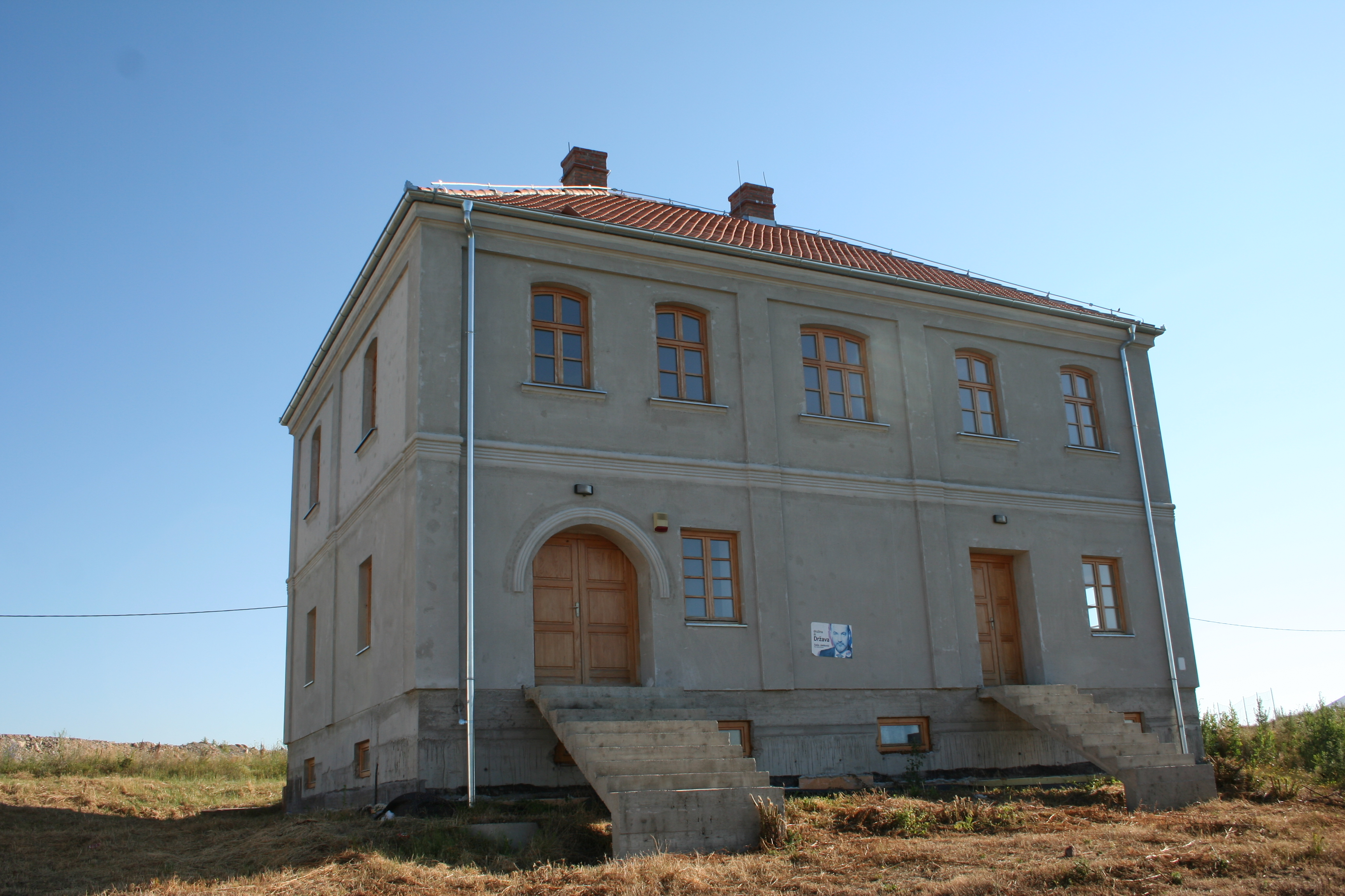 Konaci Radića i Brene Mihajlović (preseljeni iz Malog Borka u Lajkovac)